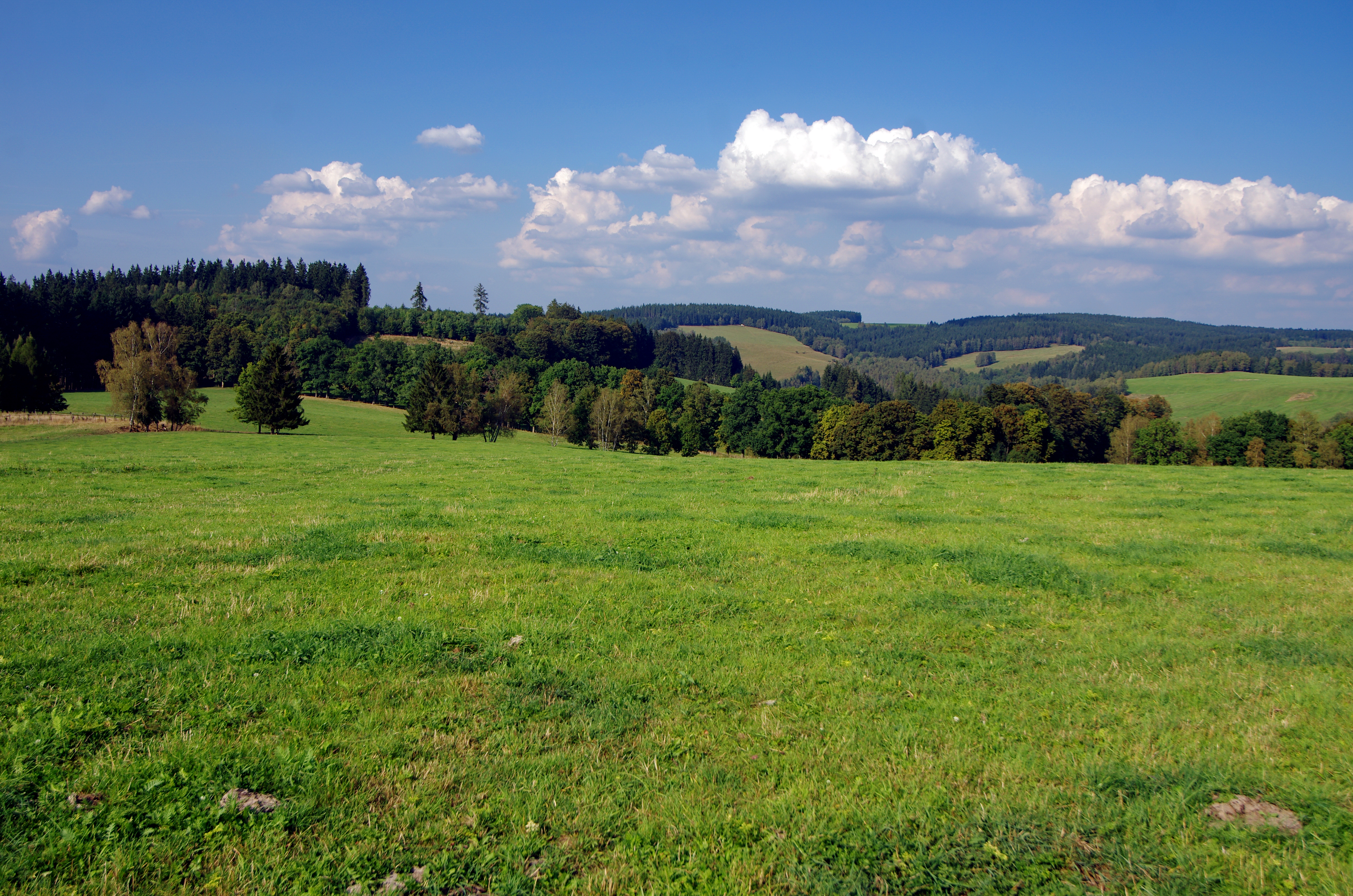 Krásná Lípa, krajina nad zaniklou obcí ve Slavkovském lese, pohled na sever, okres Sokolov